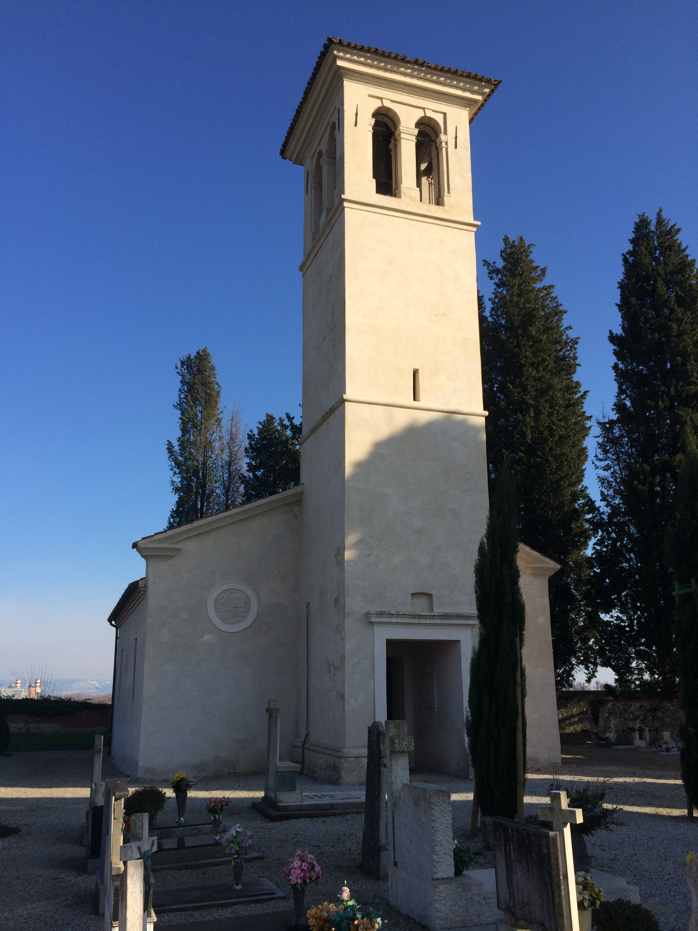 Torviscosa - Santa Maria Salute